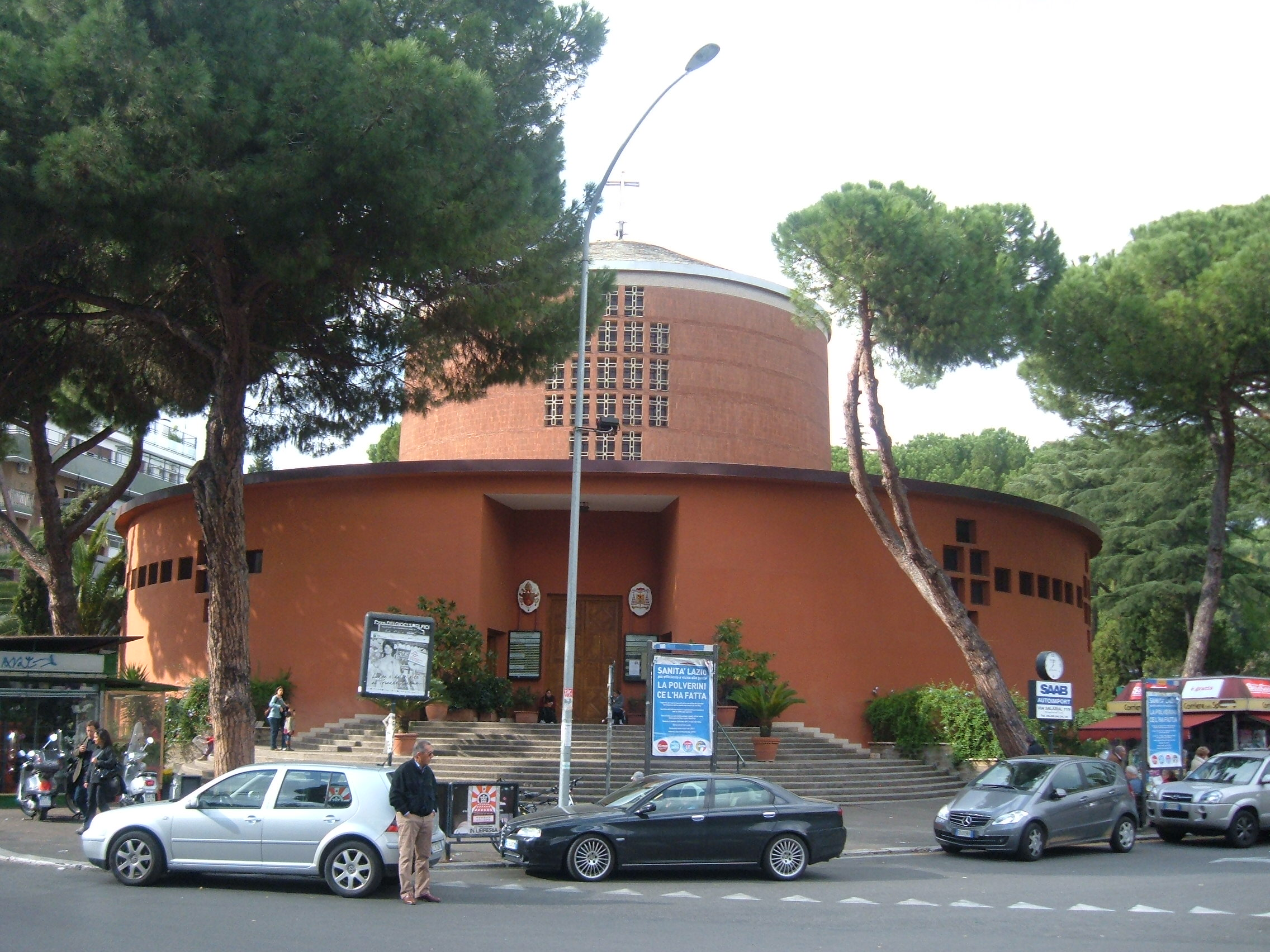 Chiesa di Santa Chiara a Vigna Clara, a Roma, nel quartiere Della Vittoria.